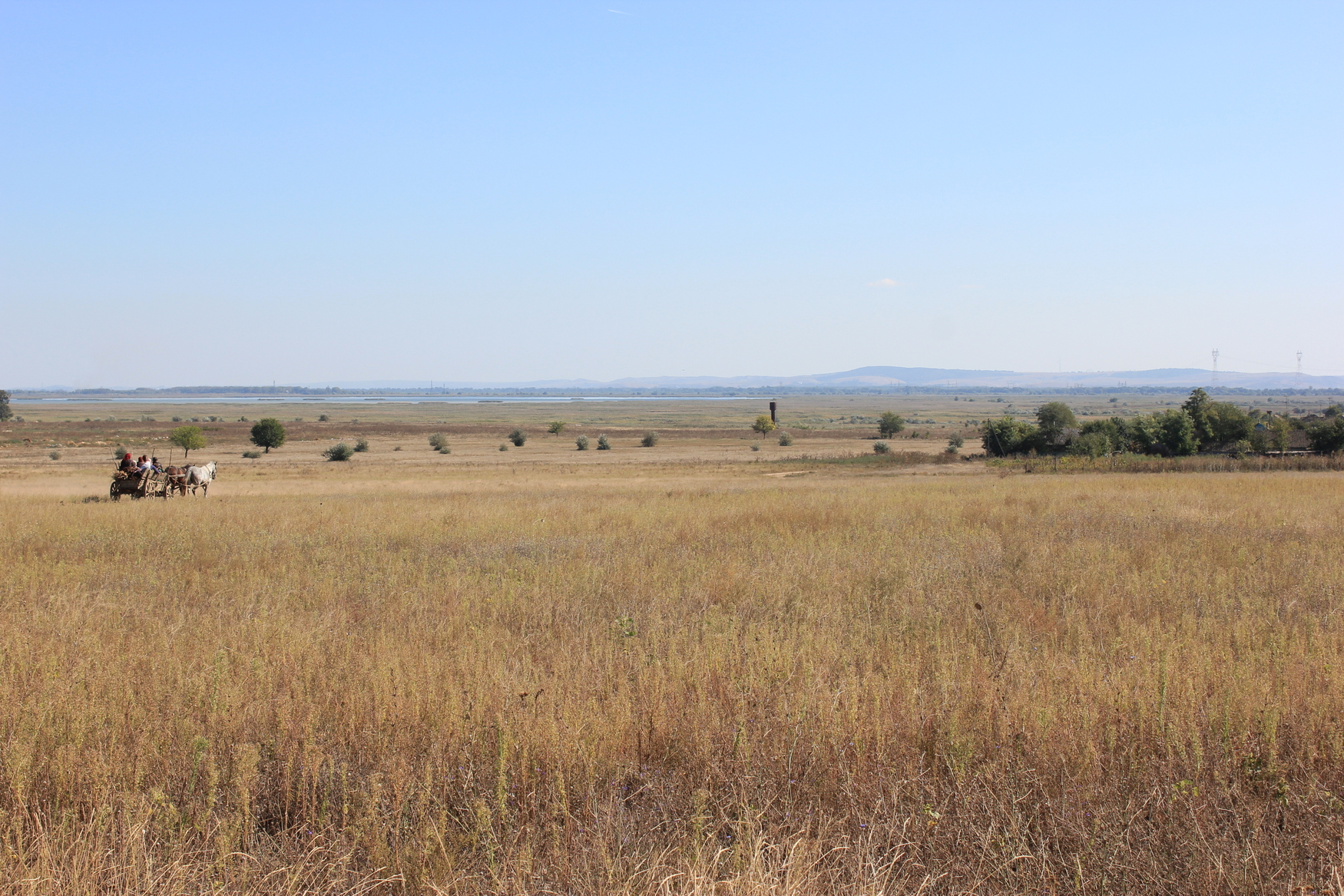 Pferdefuhrwerk im Budschak westlich von Ismajil (Ukraine).